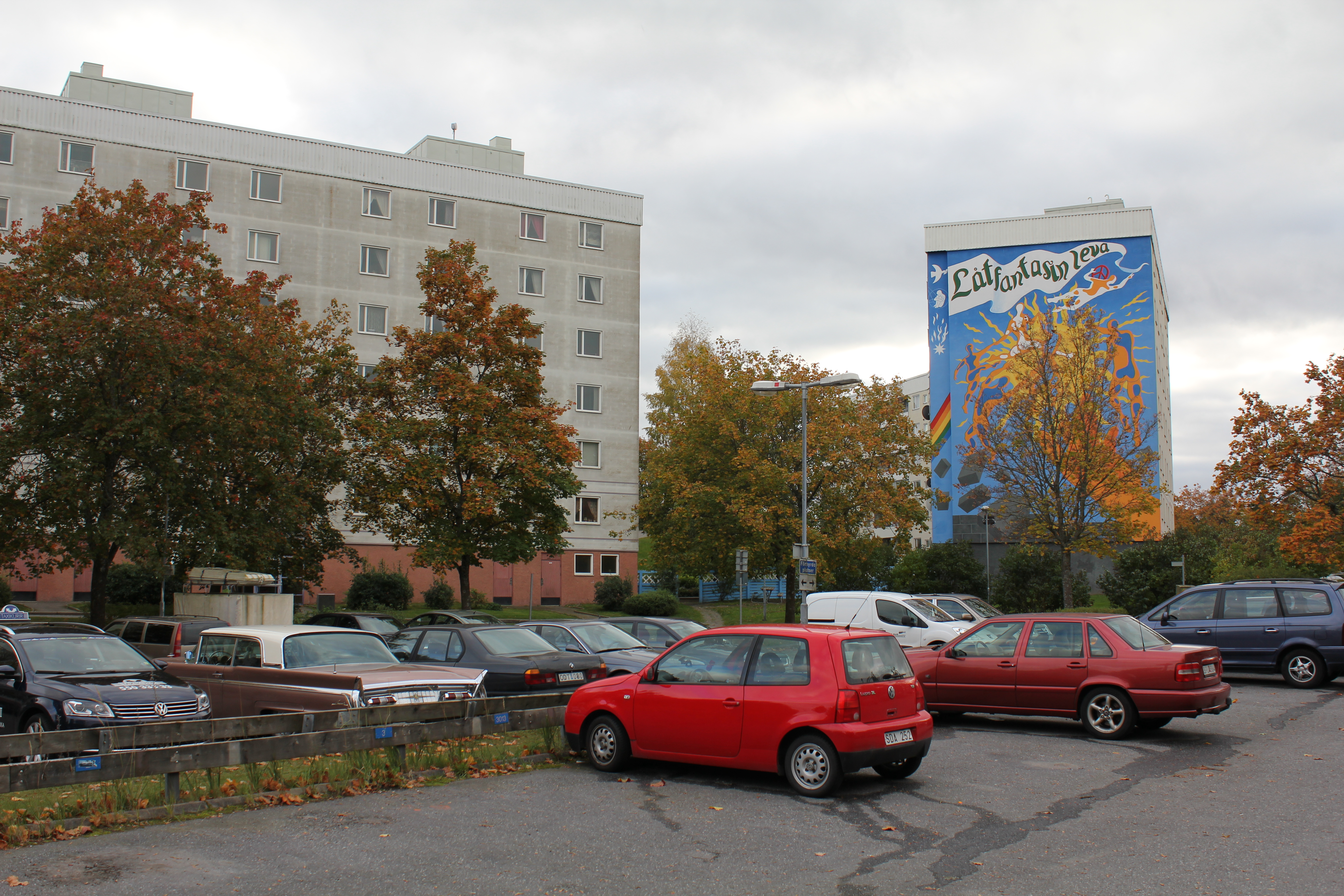 Bostadshus i Storvreten, Botkyrka kommun. Till höger muralmålningen Låt fantasin leva av Lars Isacson (1981).